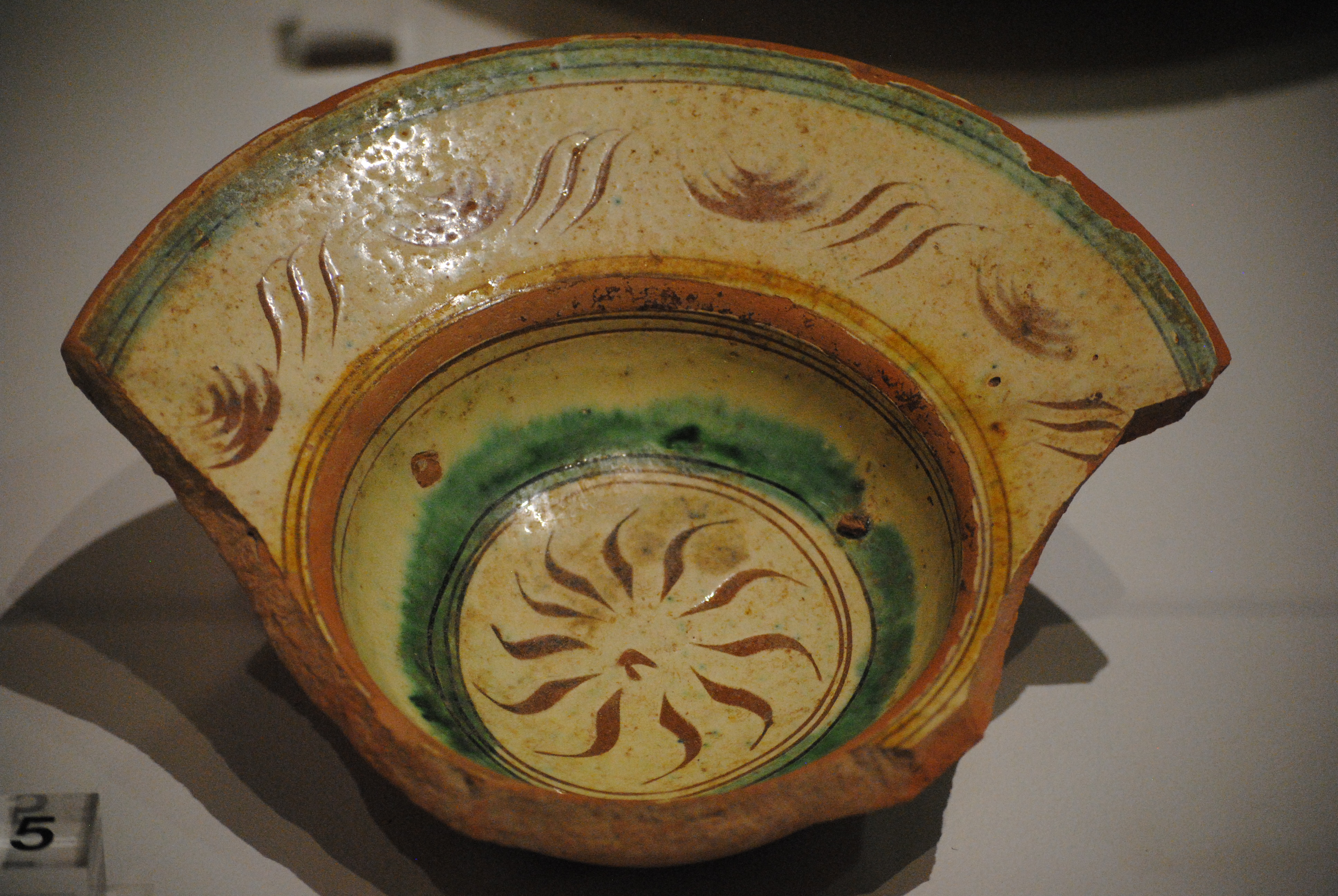 Scodella ingobbiata e graffita a stecca del 1560 - 1590 (rinvenuta durante gli scavi di via Sant'Apollonia, Pisa) - Museo nazionale di San Matteo.